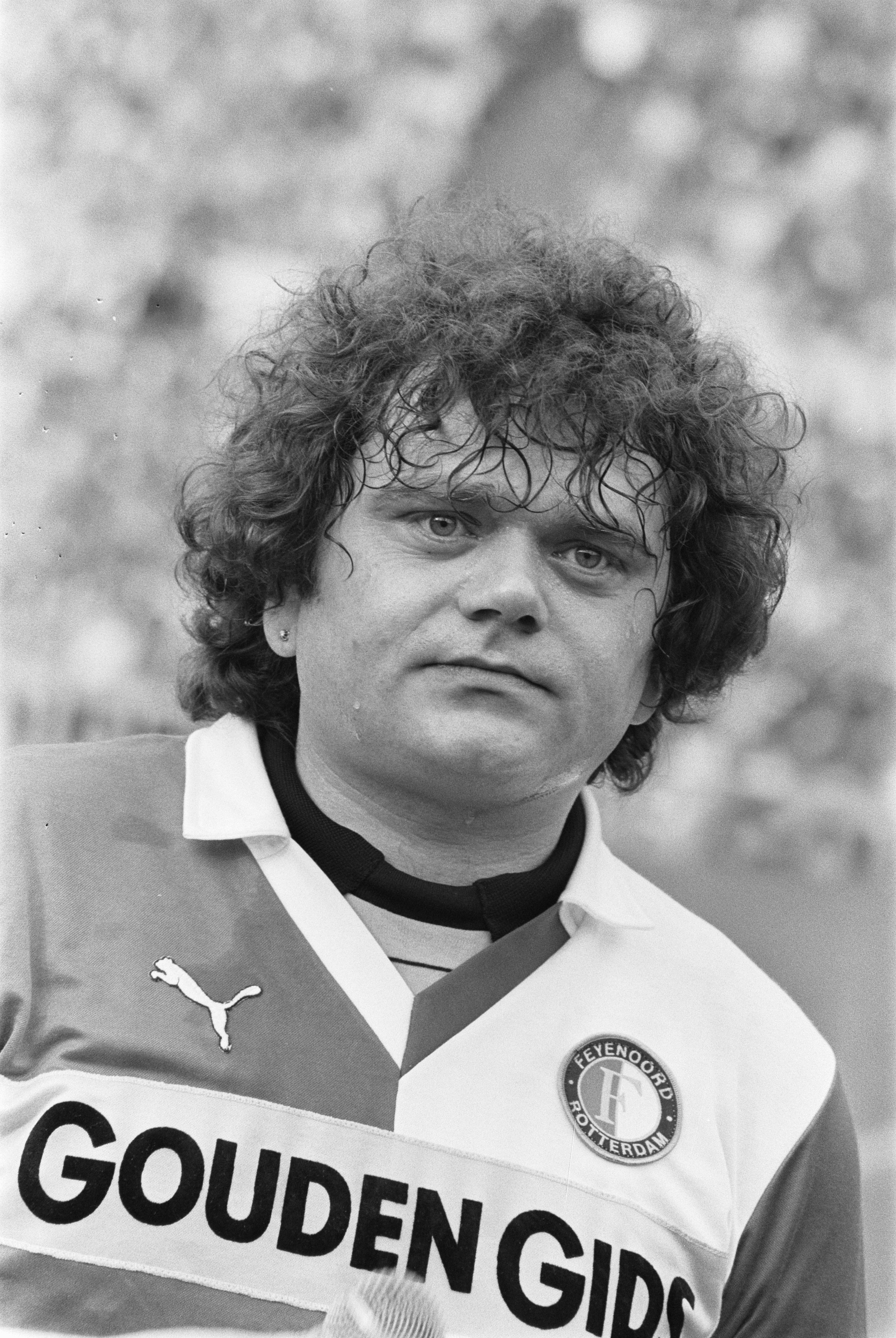 Collectie / Archief : Fotocollectie Anefo Reportage / Serie : Afscheidswedstrijd van Willem van Hanegem met het WK'74 team tegen Feyenoord in de Kuip in Rotterdam Beschrijving : Zanger André Hazes Datum : 4 juni 1983 Locatie : Rotterdam, Zuid-Holland Trefwoorden : portretten, voetbal, zangers Persoonsnaam : Hazes, André Instellingsnaam : Feyenoord Fotograaf : Bogaerts, Rob / Anefo Auteursrechthebbende : Nationaal Archief Materiaalsoort : Negatief (zwart/wit) Nummer archiefinventaris : bekijk toegang 2.24.01.05 Bestanddeelnummer : 932-6127